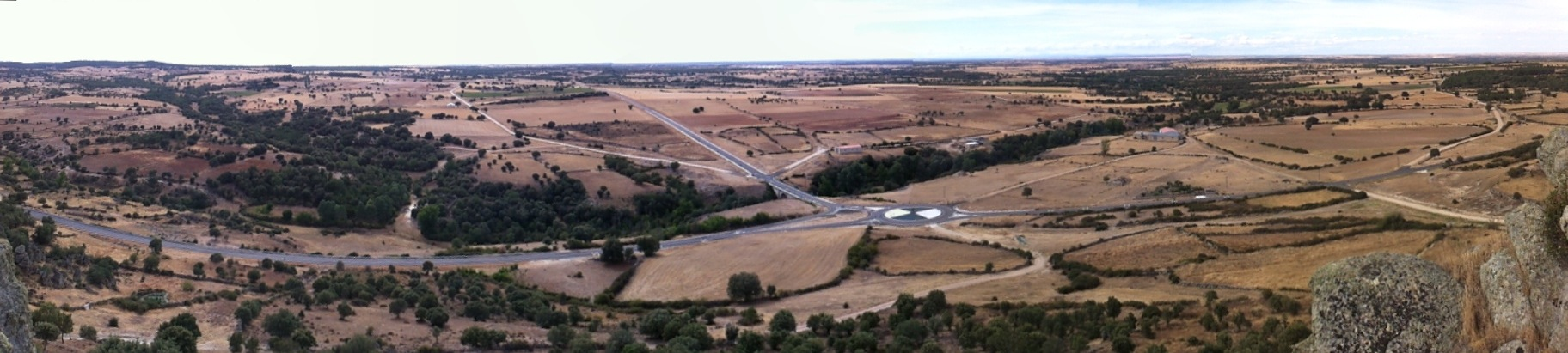 Panorámica noroeste desde el castillo de Peñausende.